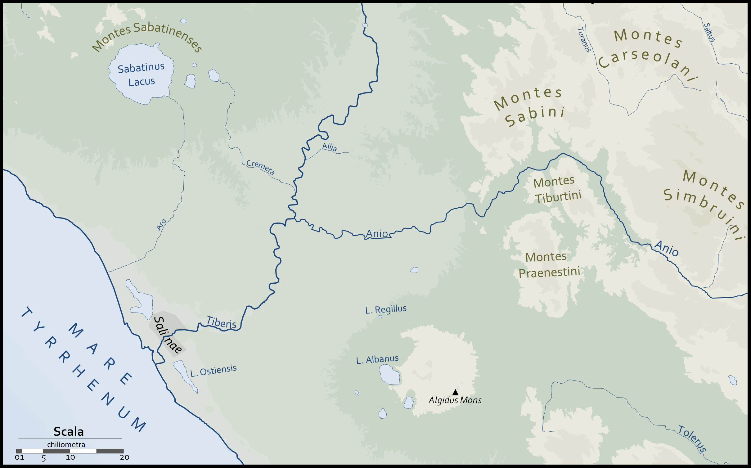 Carte vierge du Latium Vetus